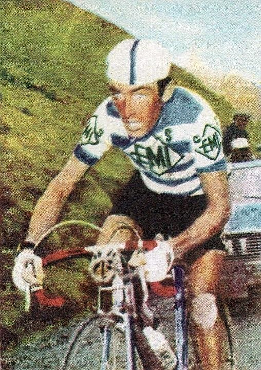 Charly Gaul (1959) - Campioni dello Sport vers 1965